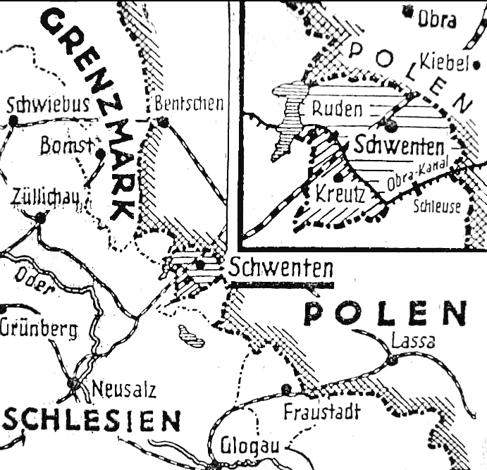 Mapa Republiki Świętnieńskiej